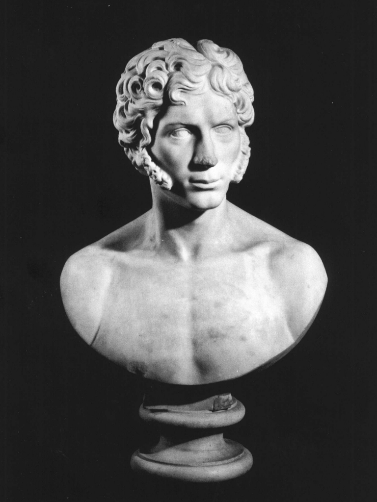 Busto di Ugo Foscolo, opera di Marco Pasato del 1861. Il busto fa parte del Panteon Veneto, conservato presso Palazzo Loredan di Campo Santo Stefano a Venezia.